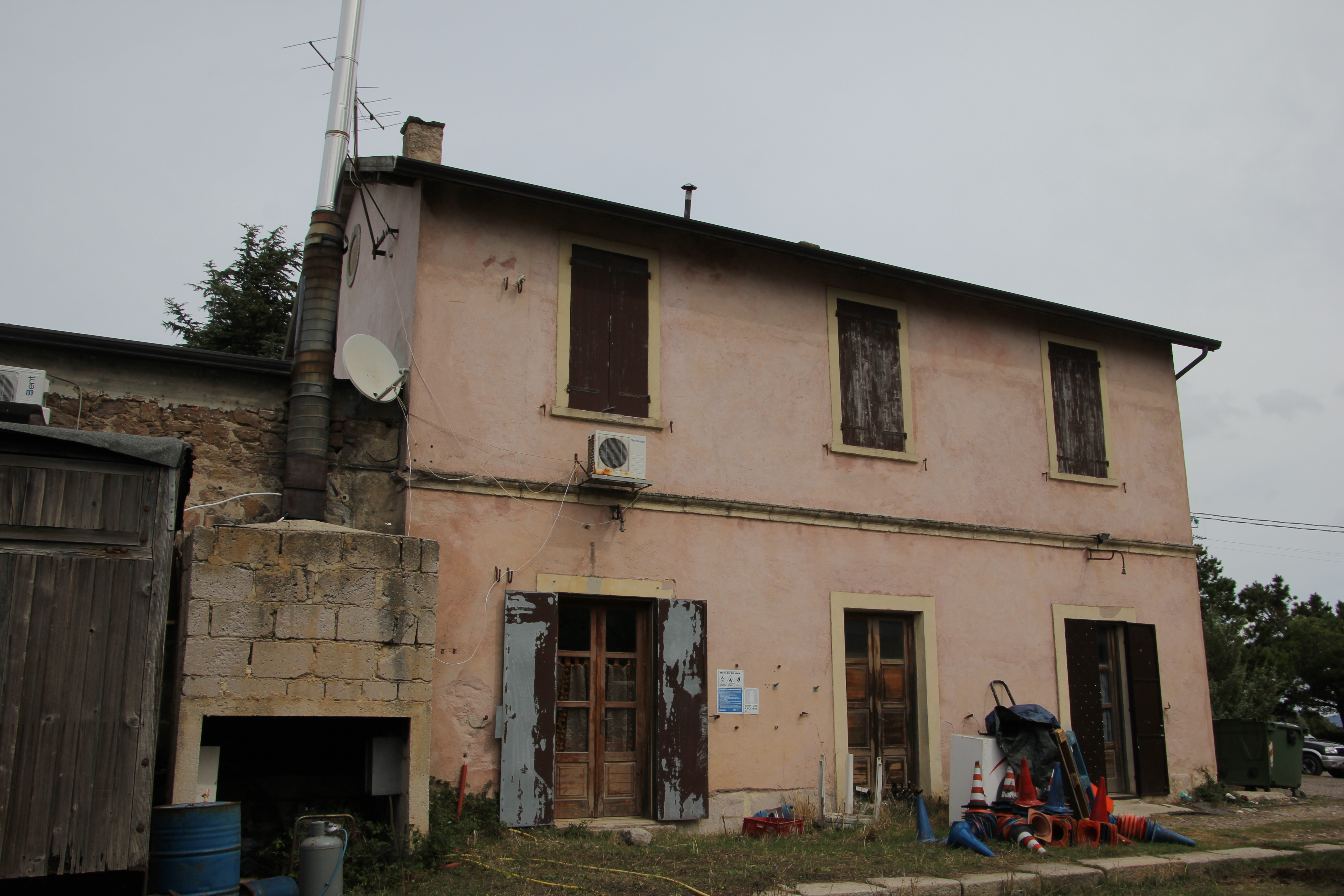 Pattada, la vecchia stazione ferroviaria